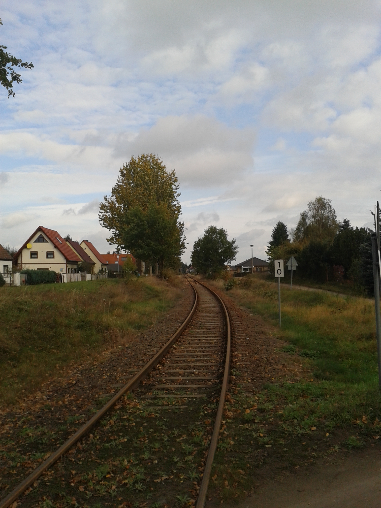 Rest der Oderbruchbahn